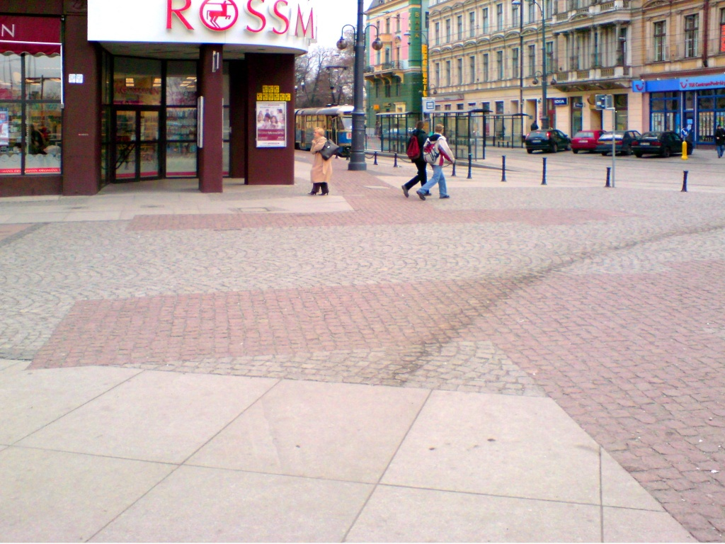 zarys Bramy Świdnickiej wykonany czerwoną kostką brukową w jezdni deptaka na ul. Świdnickiej we Wrocławiu; zdjęcie wykonane spod narożnika hotelu Monopol (róg Modrzejewskiej) w kierunku Placu Teatralnego